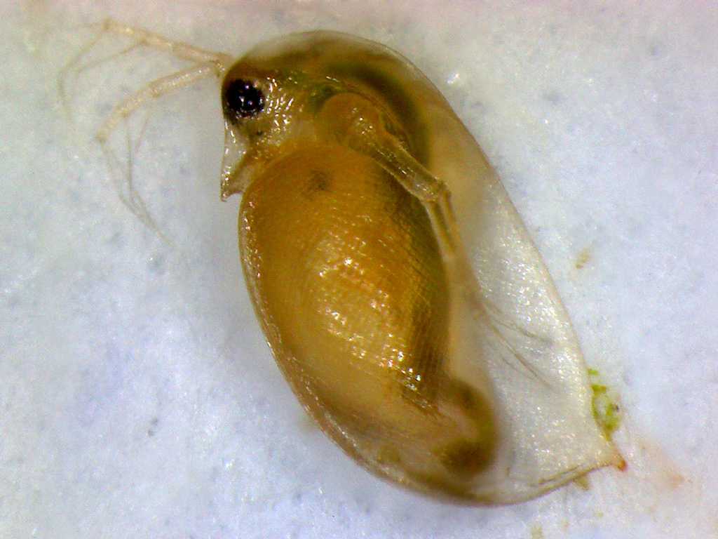 Дафния под микроскопом. ~200x